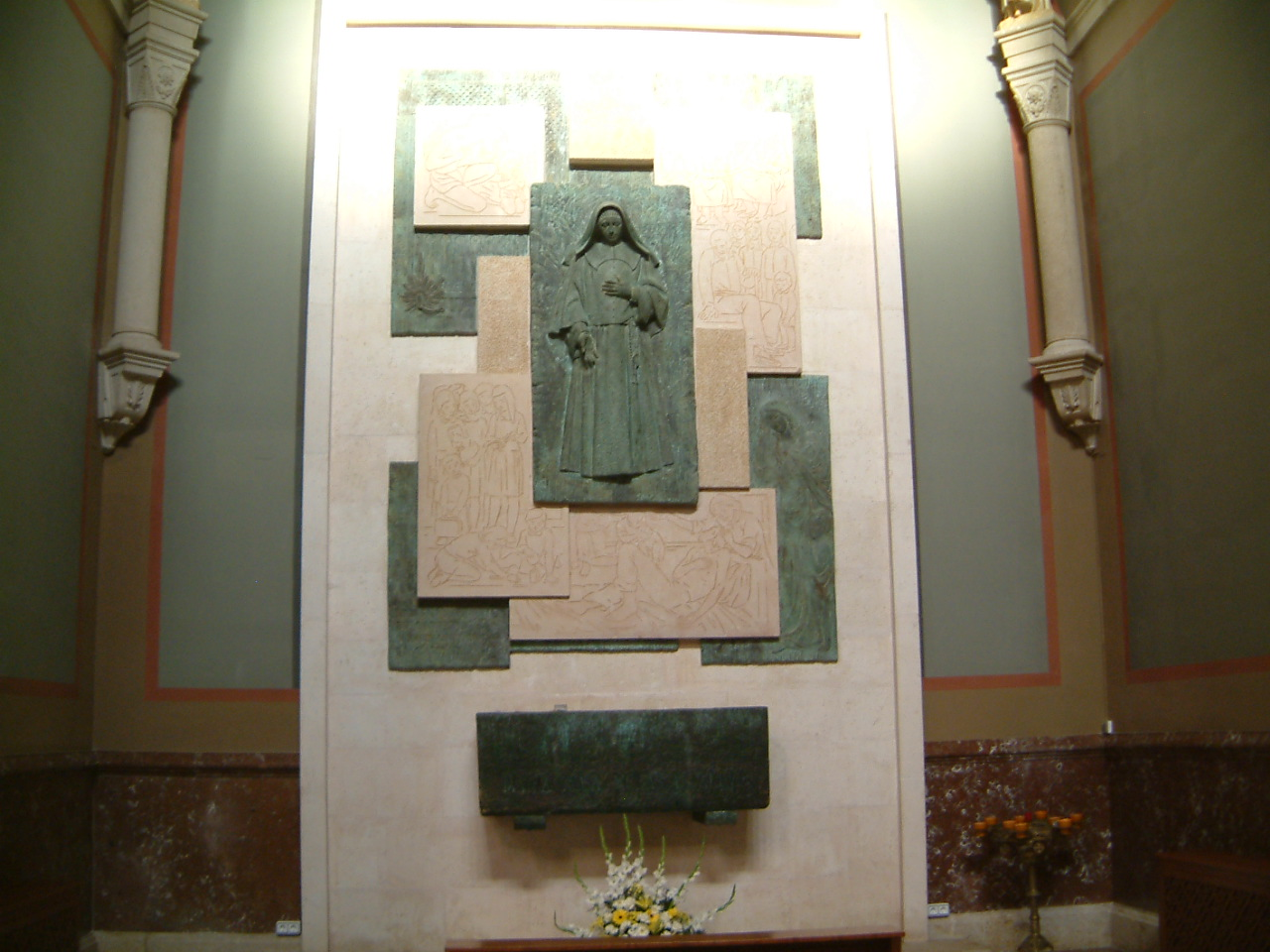 Retaule i sepulcre de Santa Rosa Maria Molas, a la Casa Mare de les Germanes de la Consolació, al barri de Jesús de Tortosa.